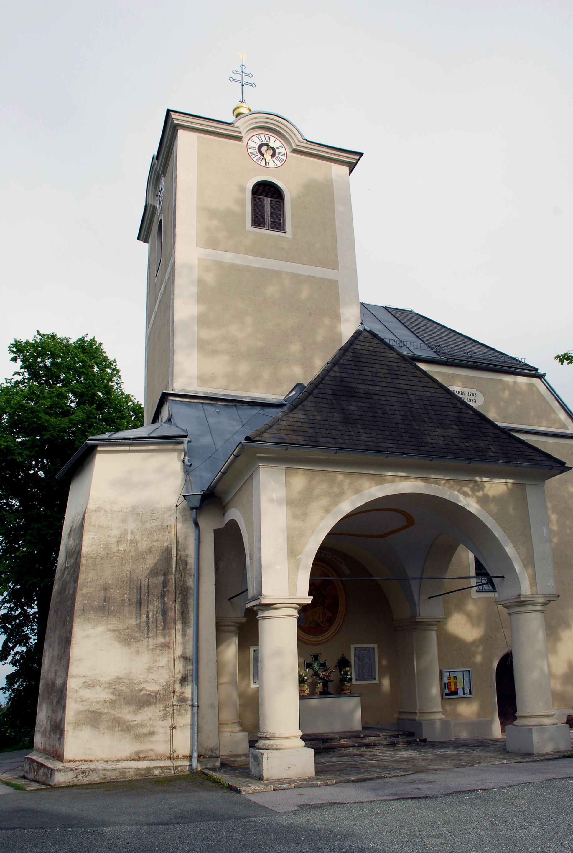 Garanas, Steiermark, Österreich: Kirche St. Anna ob Schwanberg